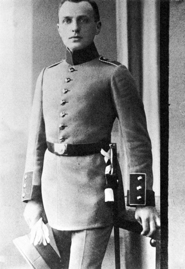 Der Dichter Alfred Lichtenstein in Militäruniform (1914).